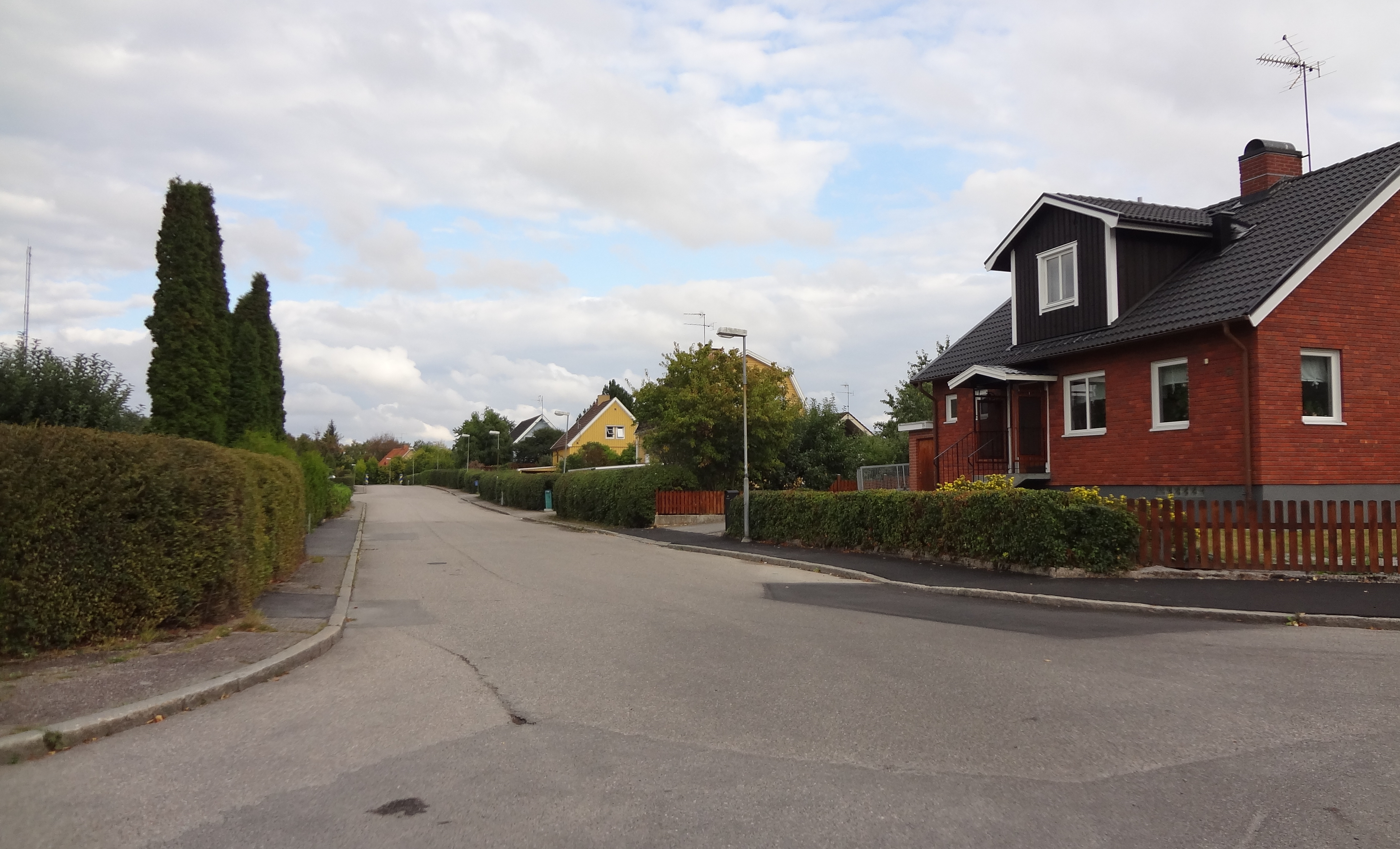 Villor på Ärnavägen i stadsdelen Ärna i Eskilstuna.